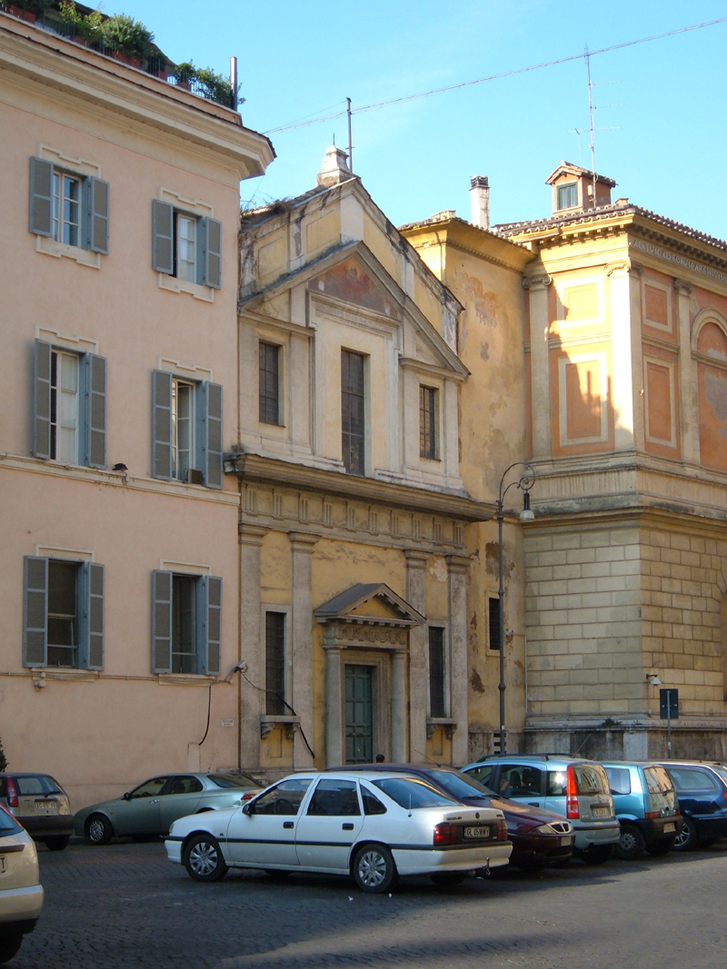 Chiesa di Santa Marta in piazza Collegio Romano, chiesa sconsacrata di Roma, nel rione Pigna. Foto personale.